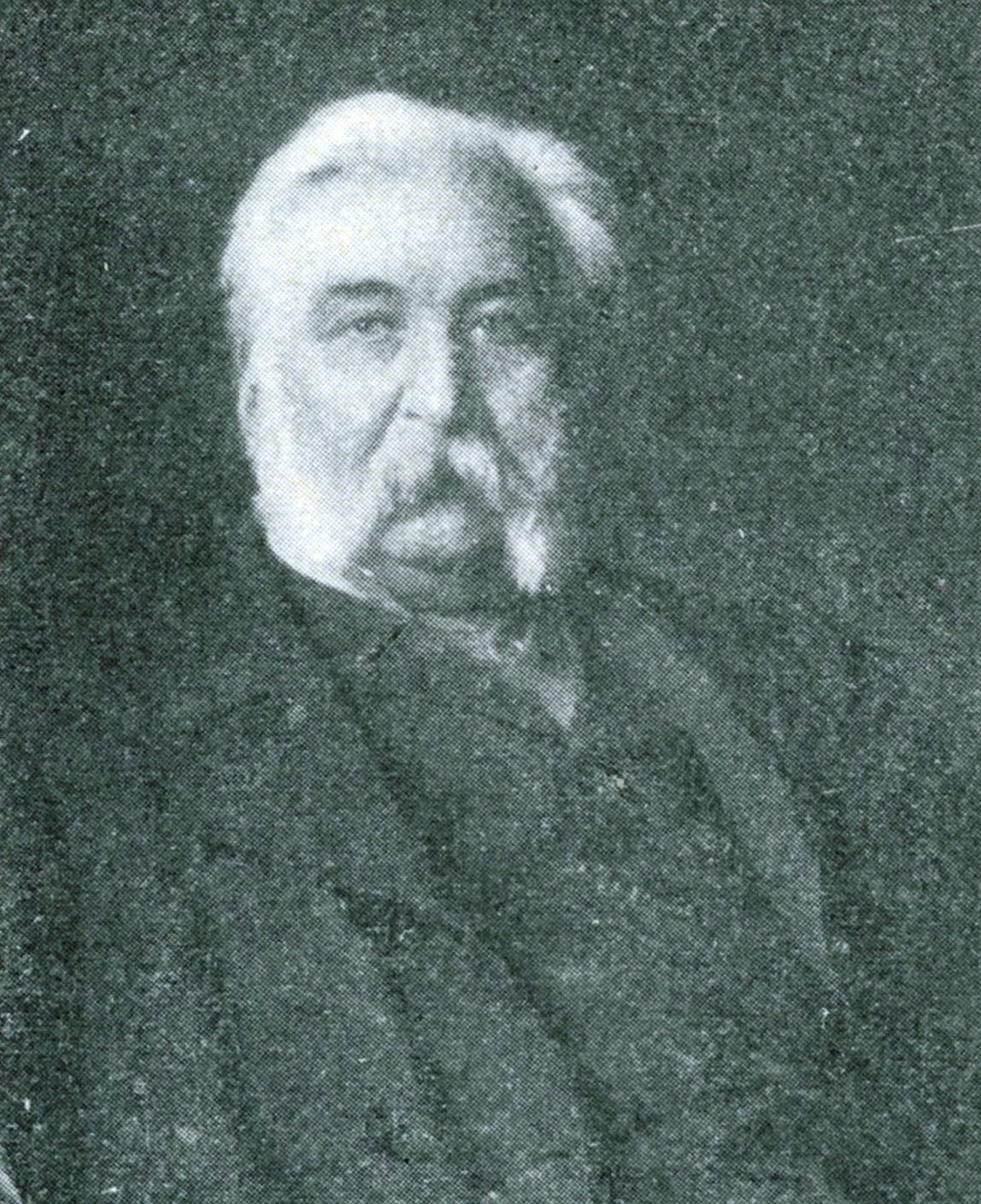 Portret Hrabiego Feliksa Sobanskiego